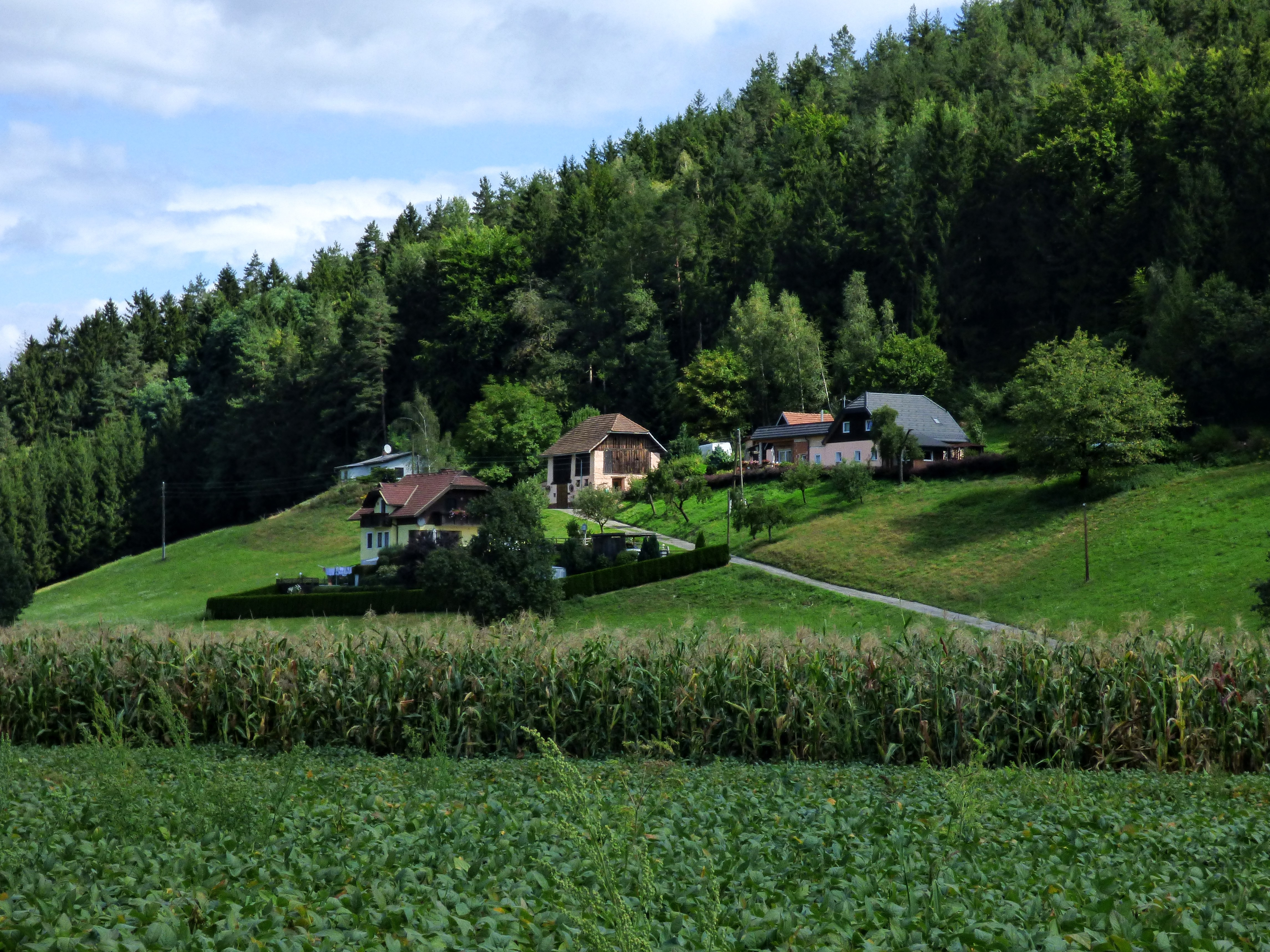 am Muraunberg, Gemeinde Sankt Veit an der Glan: Hof Bergbauer und Nachbargebäude